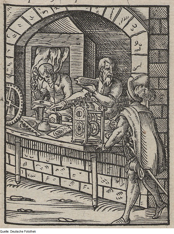 Original image description from the Deutsche Fotothek Ständebuch & Handwerk & Uhrmacher